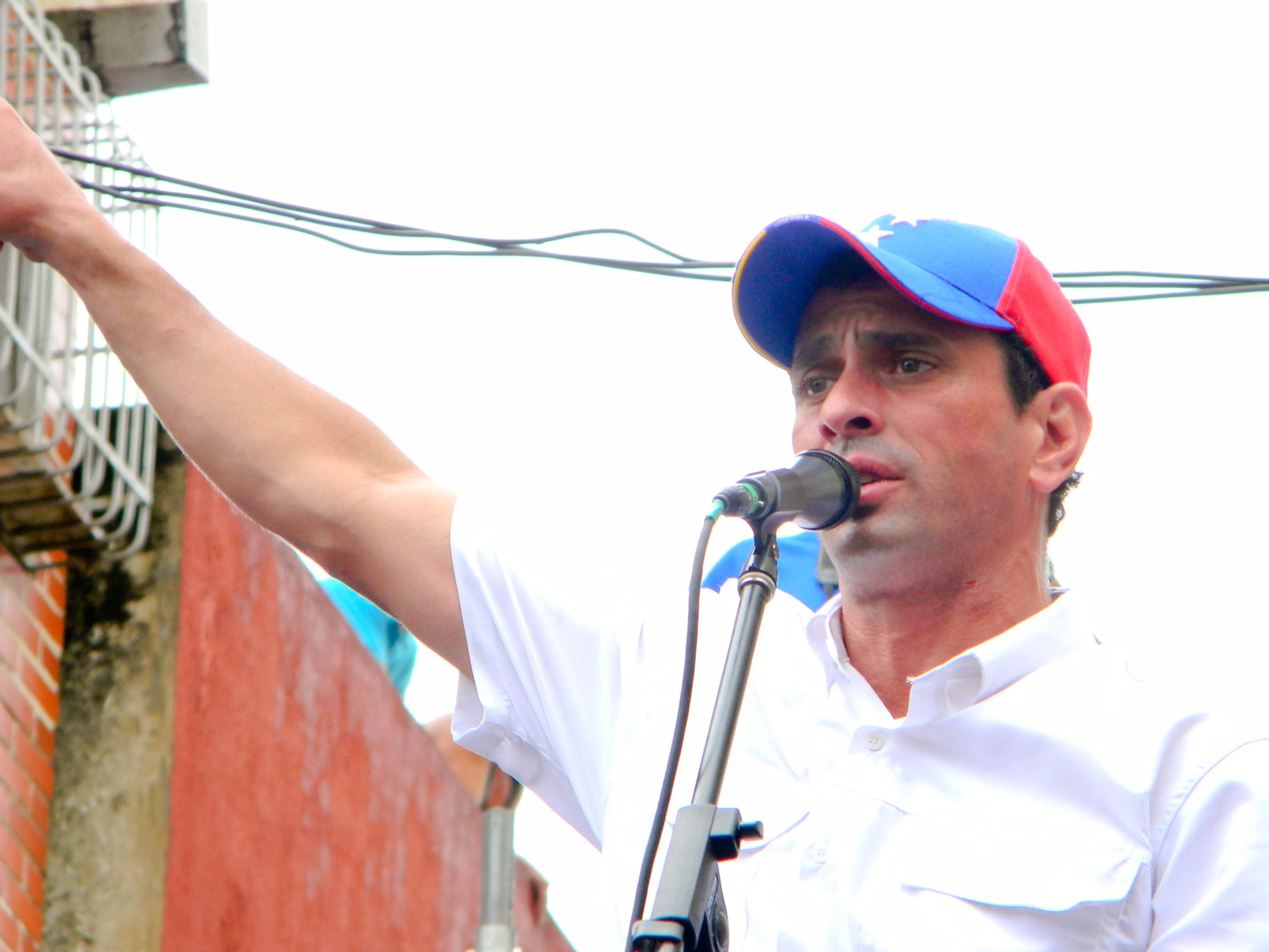 El Caprilazo en Santa Teresa del Tuy. Sábado 18 de agosto 2012.